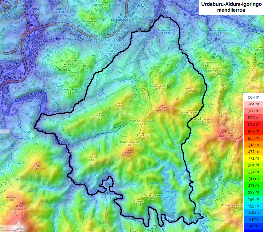 Urdaburu-Aldura-Igoringo mendilerroaren mapa topografikoa.